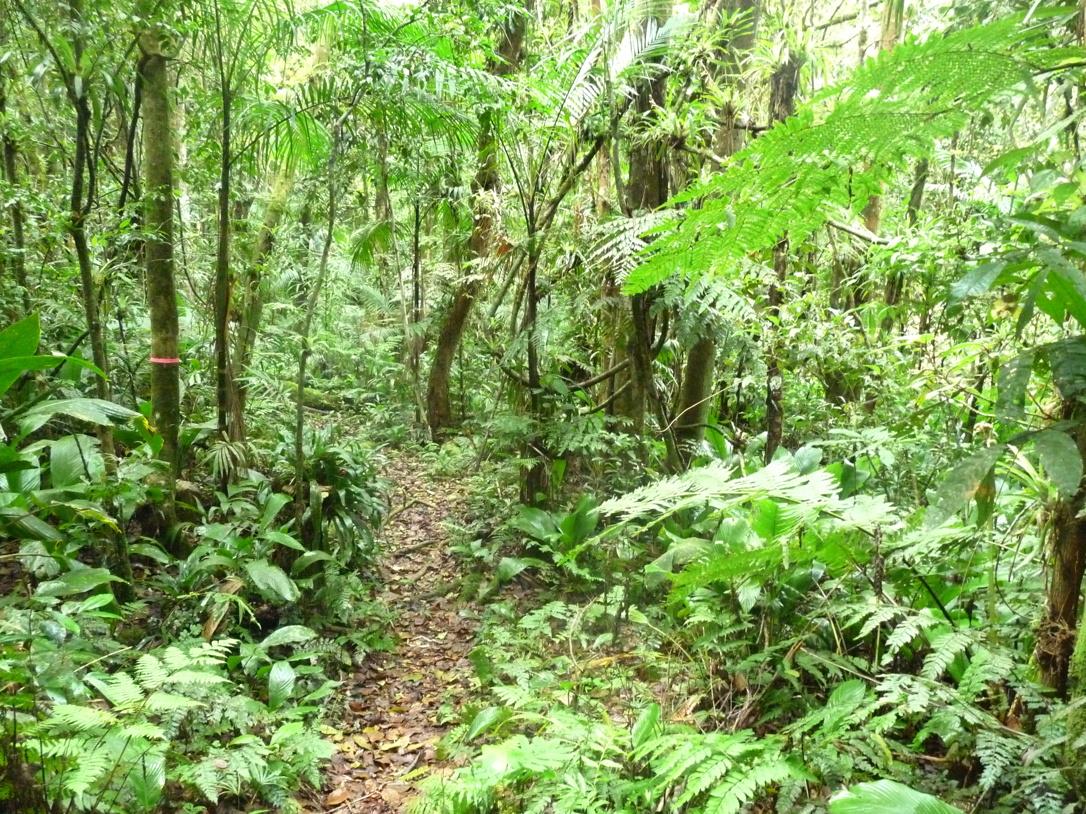 Trilha do braço do rio taquaral